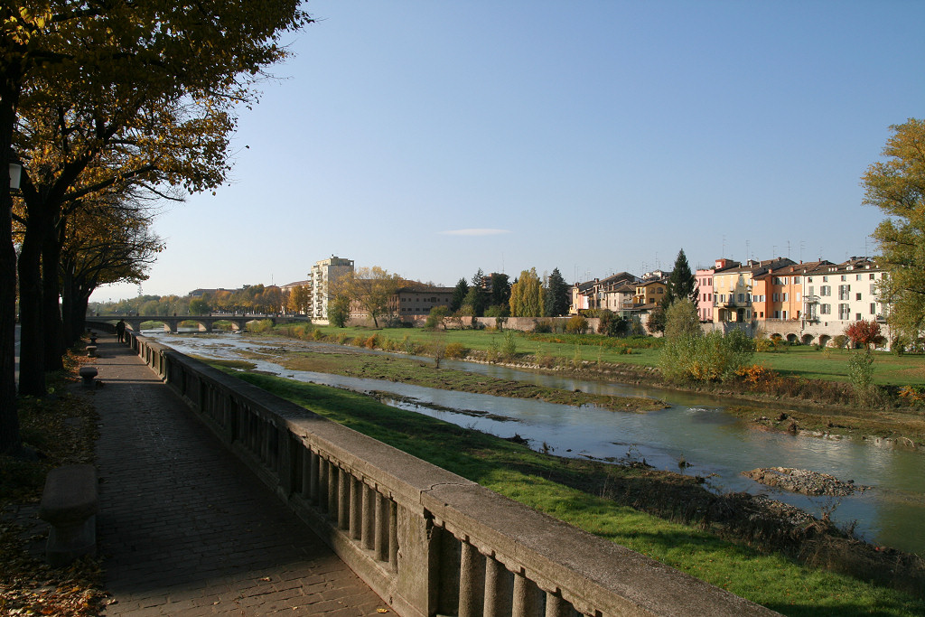 Lungoparma, il torrente Parma guardando in direzione del Ponte Caprazucca, Parma (ITALY).